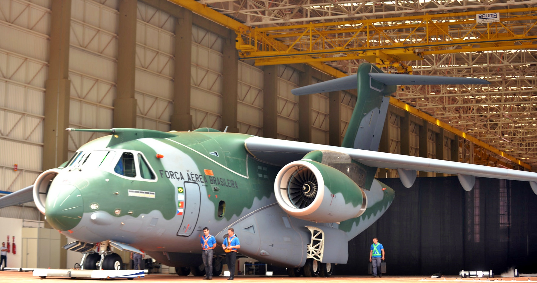 21/10/2014, Gavião Peixoto - SP Fotos: Tereza Sobreira